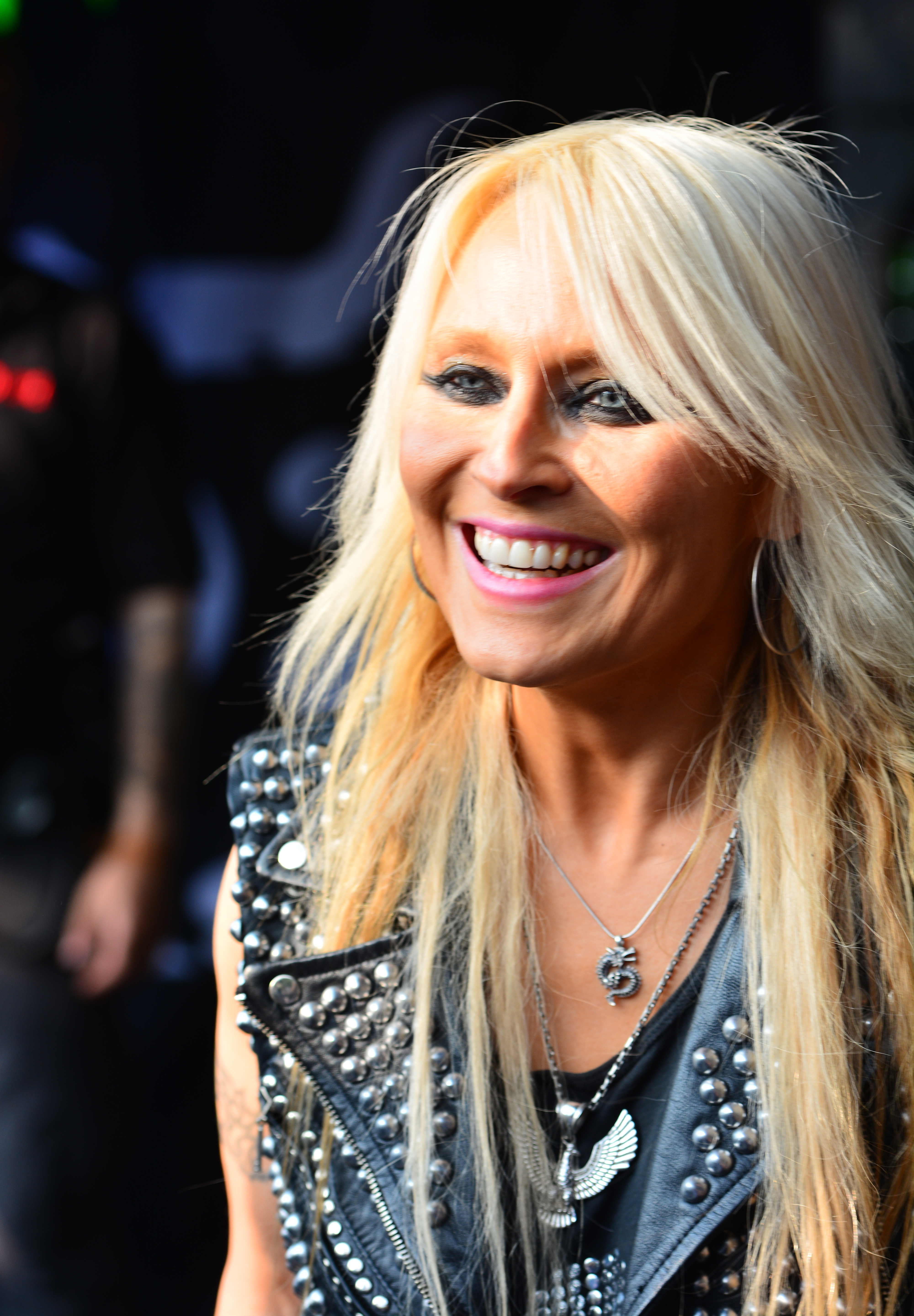 Doro Pesch beim Meet & Greed auf dem Wacken Open Air 2014